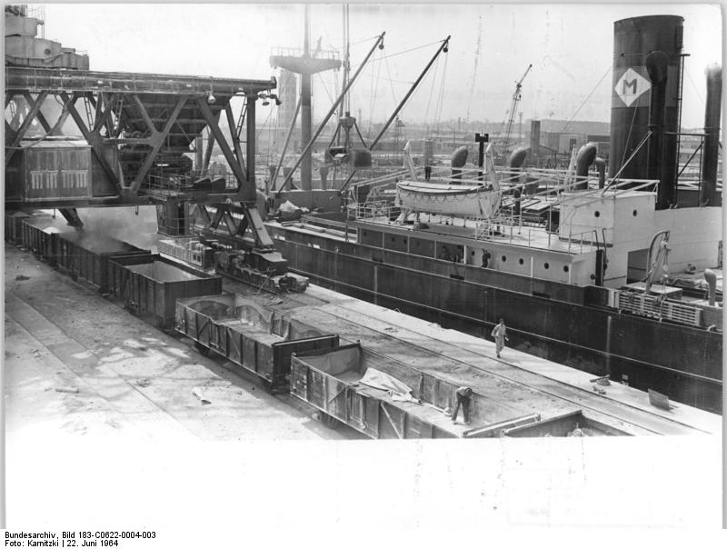 Rostock, Überseehafen, Frachtschiff, Güterwaggons Zentralbild Karnitzki 22.6.1964 Zur diesjährigen Ostseewoche Zum ersten Mal wird während der diesjährigen Ostseewoche im Rostocker Überseehafen ein "Tag der offenen Tür" veranstaltet. Tausende In- und ausländische Gäste des großen Völkertreffens im DDR-Küstenbezirk werden Gelegenheit haben, sich von den zügigen Baufortschritten auf der Großbaustelle im Norden der Republik zu überzeugen. Inzwischen hat sich die Zahl der Schiffsliegeplätze auf 15 erhöht. In diesen Tagen wurde im Überseehafen die zweieinhalbmillionste Tone umgeschlagen. Am Massengutpier (unser Foto) ist durch den Einbau moderner, elektronisch gesteuerter Bandwaagen der Umschlagprozeß weiterhin rationalisiert worden.